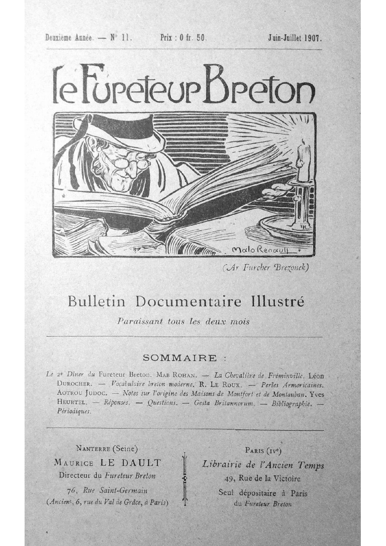 Bulletin documentaire illustré, crée par Maurice Le Dault en 1905 (librairie bretonne rue du Val de Grace Paris)